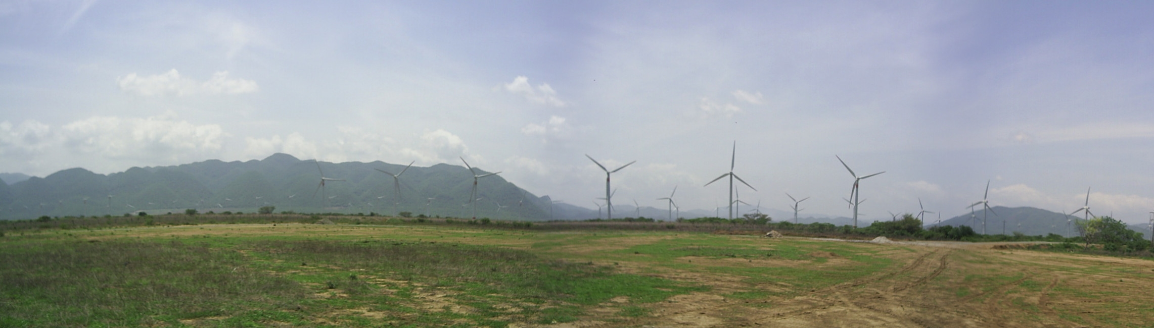 Parque eolico La Venta Oaxaca Mexico